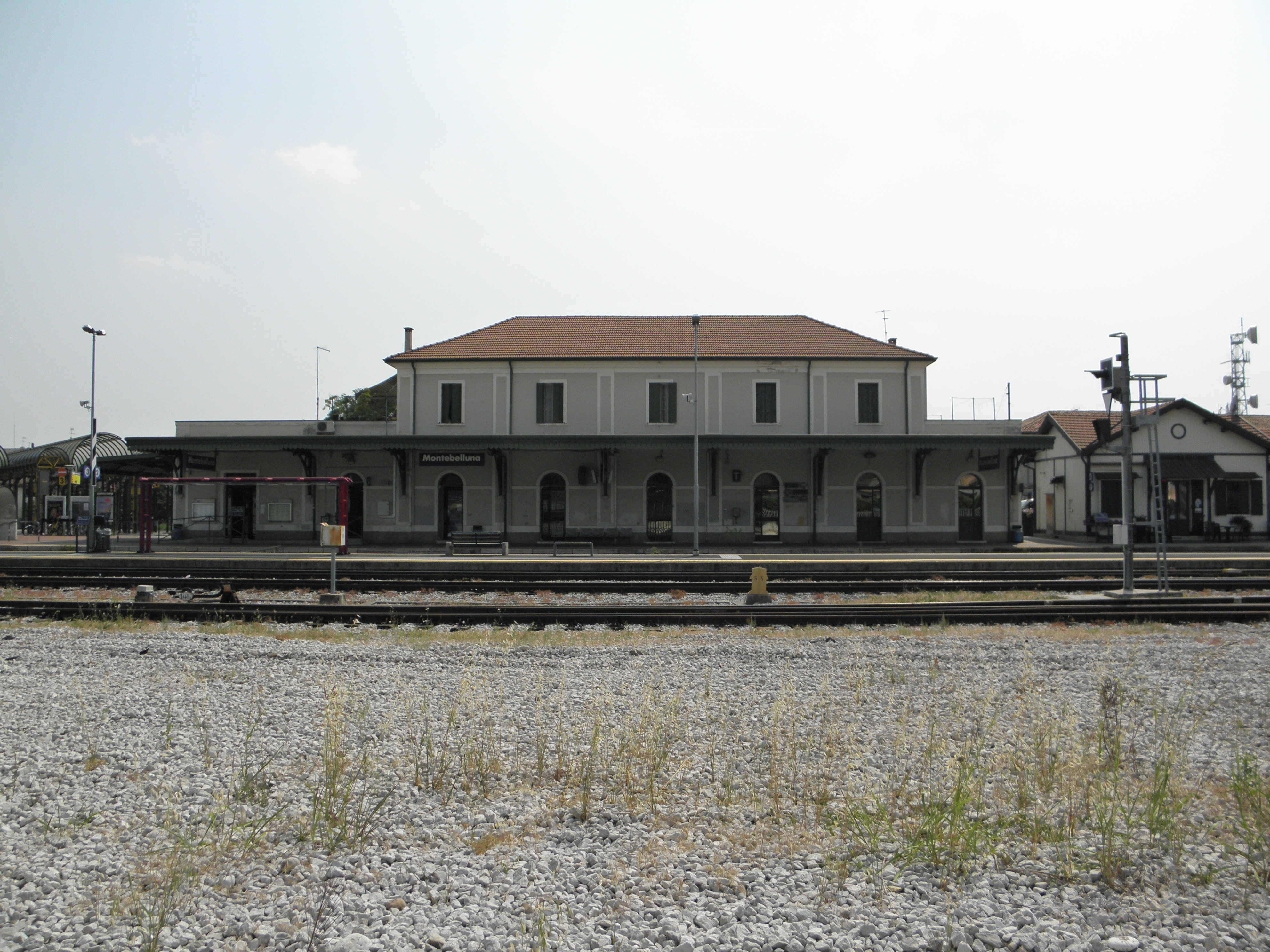 Montebelluna, la stazione ferroviaria.